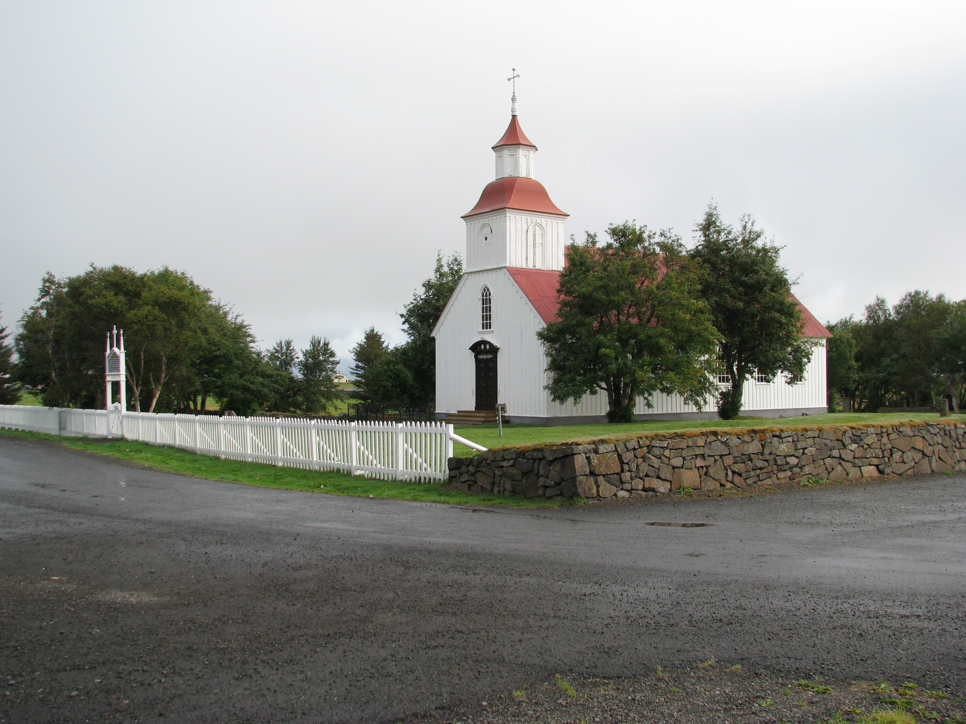 Moðruvellir, Hörgárdalur, Iceland